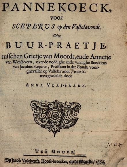 Titelblad van een pamflet tegen Jacobus Sceperus (1607-1677)